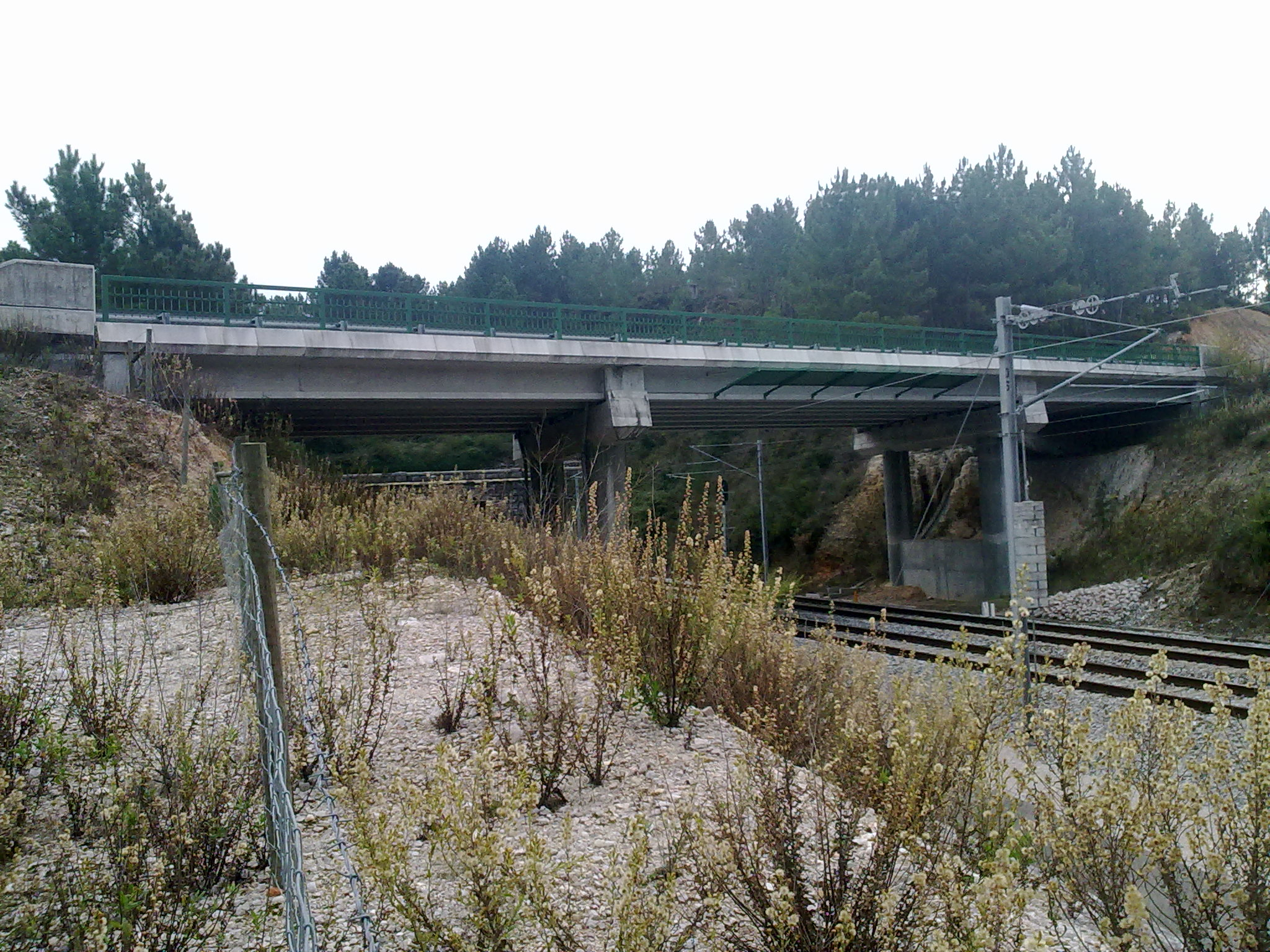 Viaduto de Chão de Maçãs lado norte, sobre a linha ferroviária, em 31-11-2011